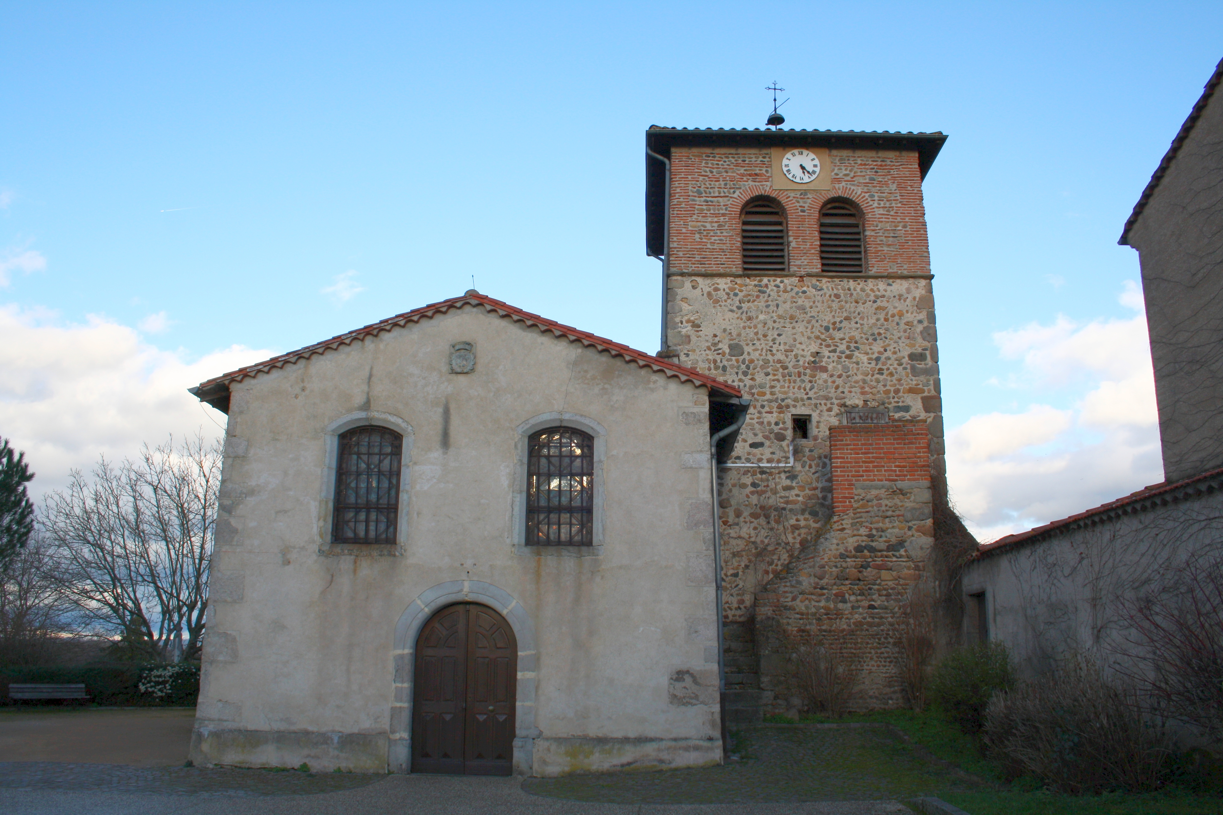 Eglise Saint-Barthélémy d’Unias